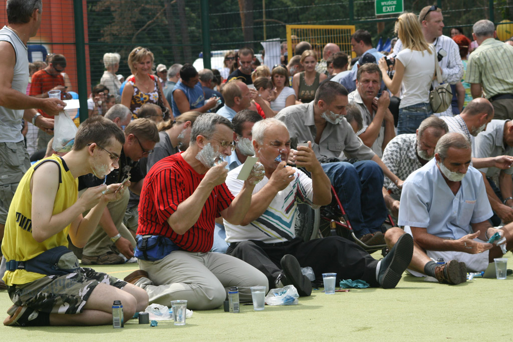 Próba bicia rekordu Giunessa w kategorii „Największa ilość golących się w jednym miejscu”, II Festiwal Hanzeatycki, Goleniów 2007